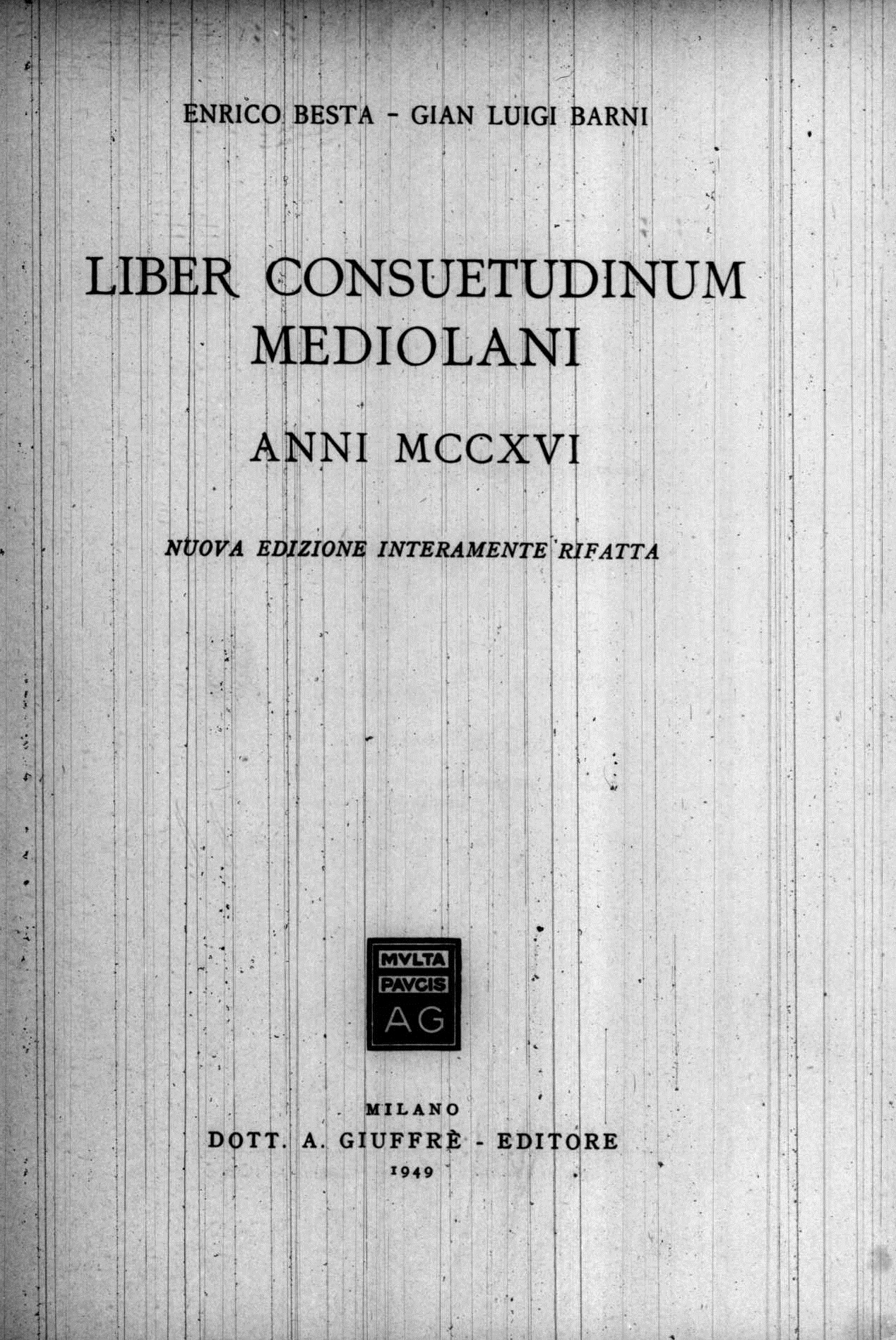 Pagina 97